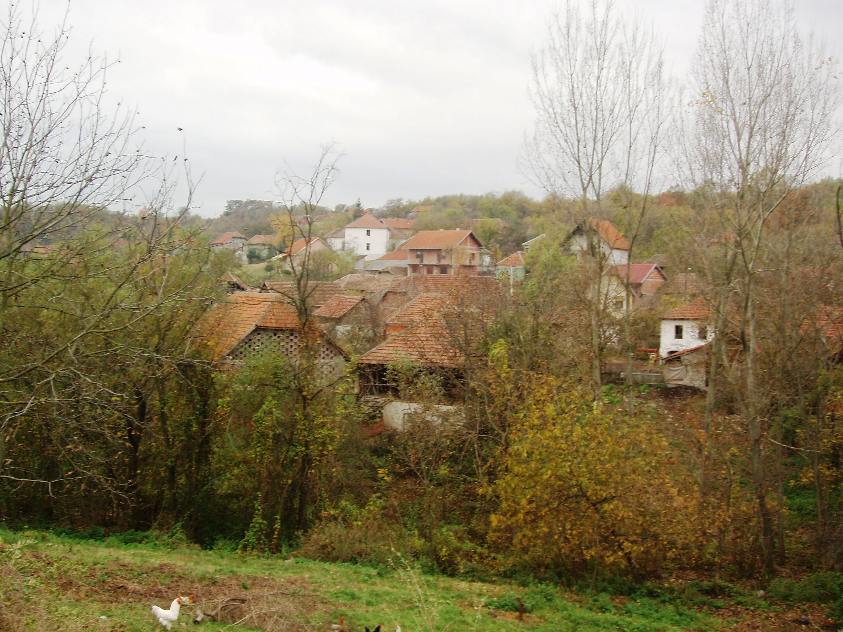 Рујиште (Ражањ)